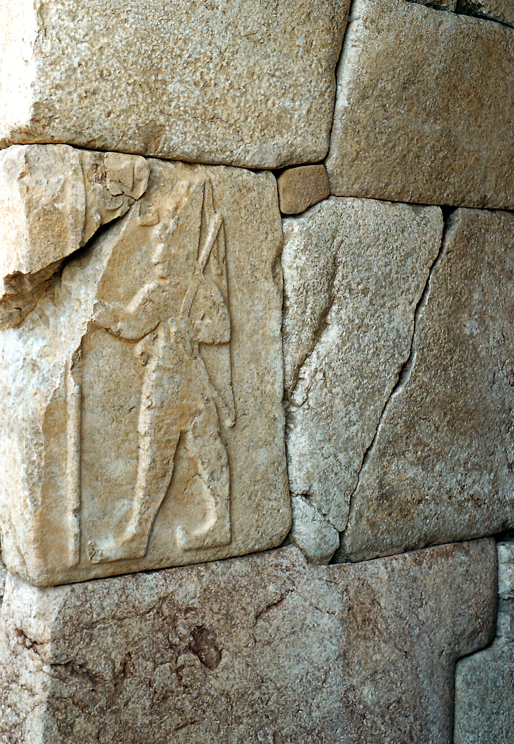 Hieroglyphenkammer in der Südburg, Relief des Šuppiluliuma II., Ḫattuša, Zentraltürkei